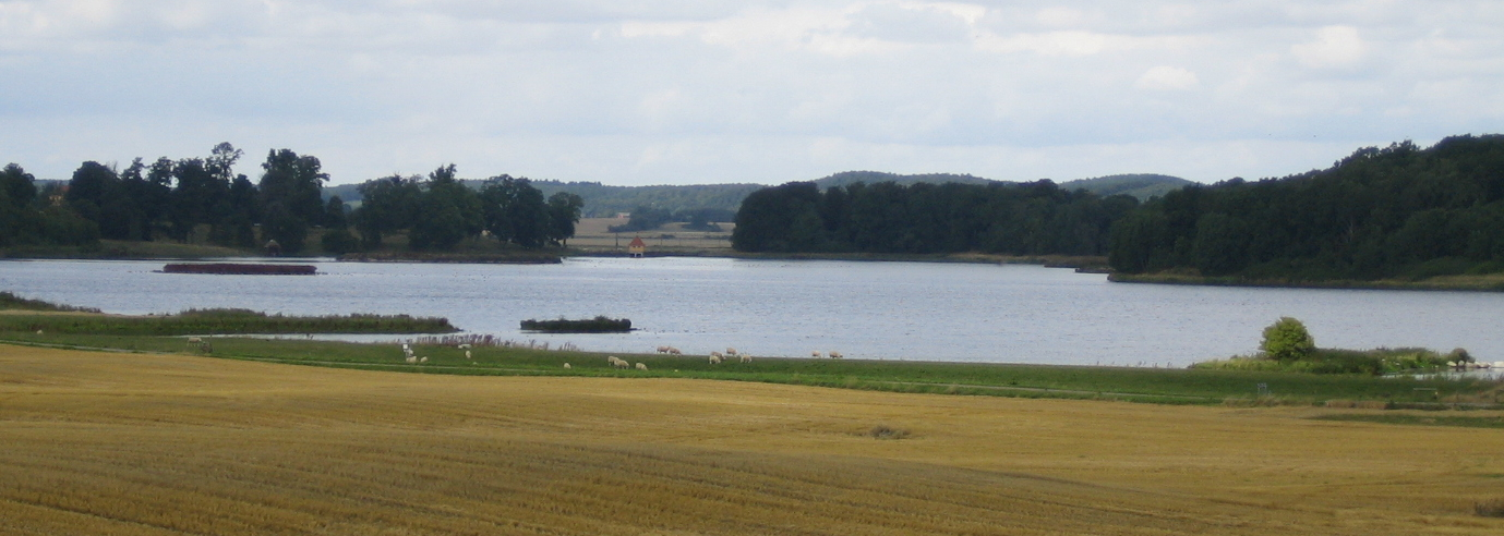 The restored lake Näsbyholmssjön near Skurup, Sweden